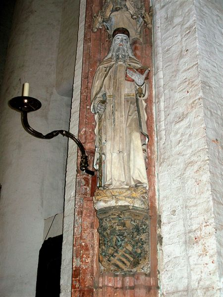 Lübeck Maria Kirke i Sydslesvig. Holy Anthony, 1457 donation to the church by senator Hermann Sundesbeke.)